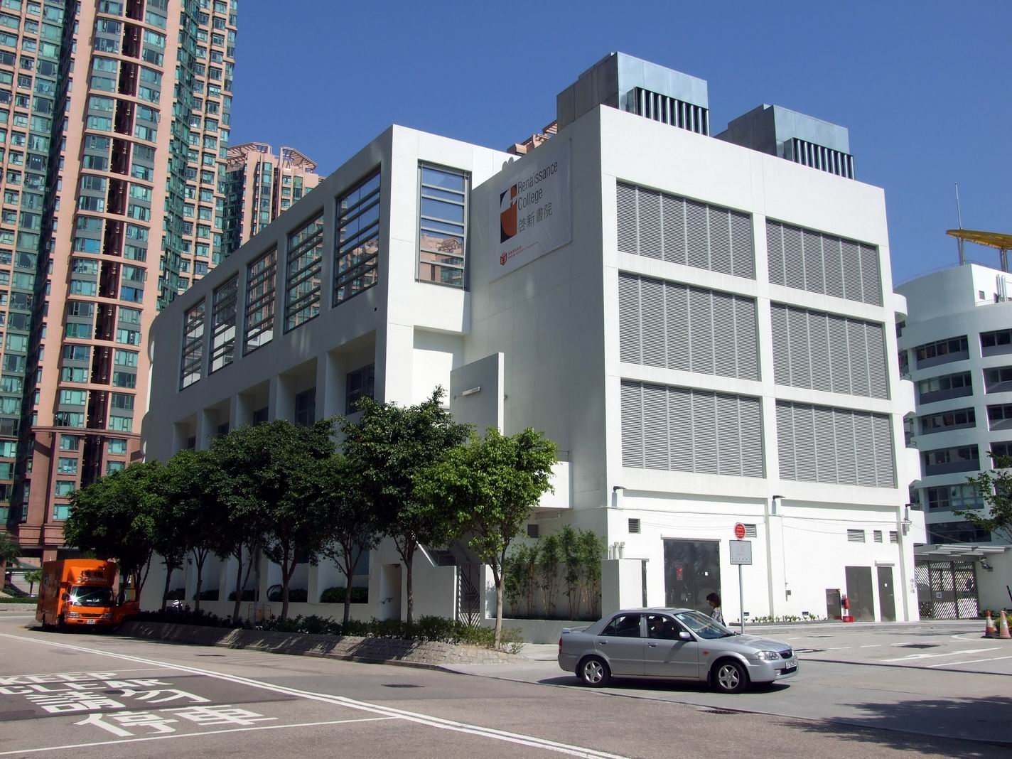 啟新書院